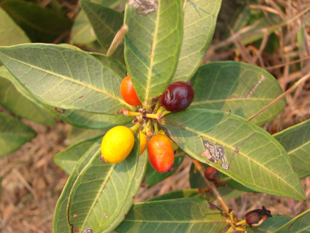 Eugenia calycina - MYRTACEAE Cristalina - Goiás - Brasil.